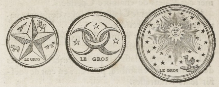 Prüfungssiegel (cachets) der Académie de l’art de la coiffure des dames françoises von Legros de Rumigny.